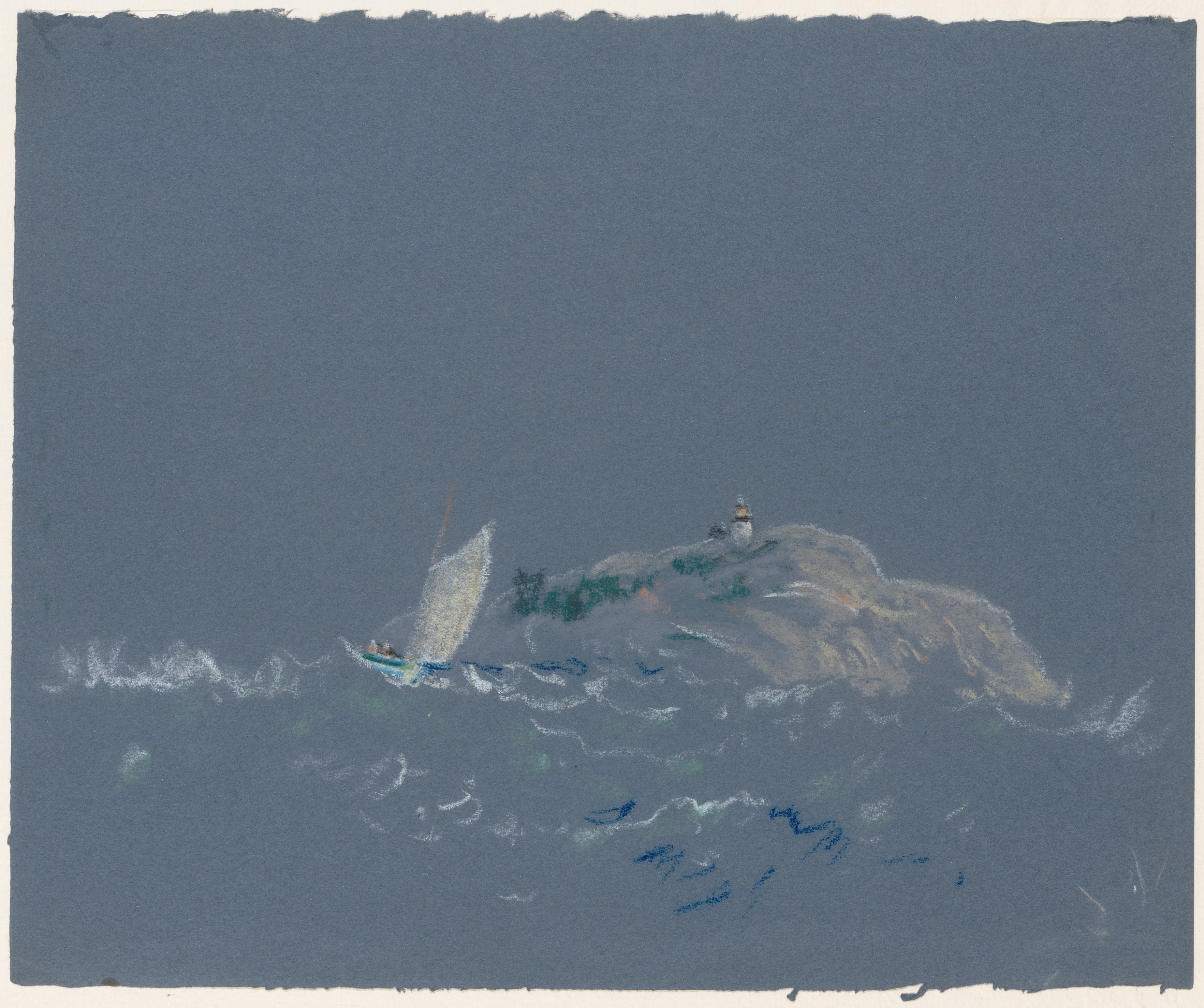 Drawing; Drawings